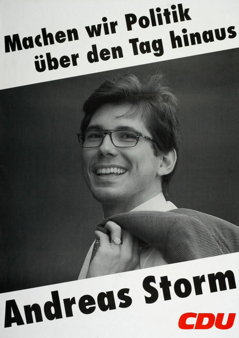 Machen wir Politik über den Tag hinaus Andreas Storm CDU Abbildung: Porträtfoto Plakatart: Kandidaten-/Personenplakat mit Porträt Objekt-Signatur: 10-001: 4031 Bestand: Plakate zu Bundestagswahlen (10-001) GliederungBestand10-18: Plakate zu Bundestagswahlen (10-001) » Die 13. Bundestagswahl am 16. Oktober 1994 » CDU » Mit Porträtfoto Lizenz: KAS/ACDP 10-001: 4031 CC-BY-SA 3.0 DE